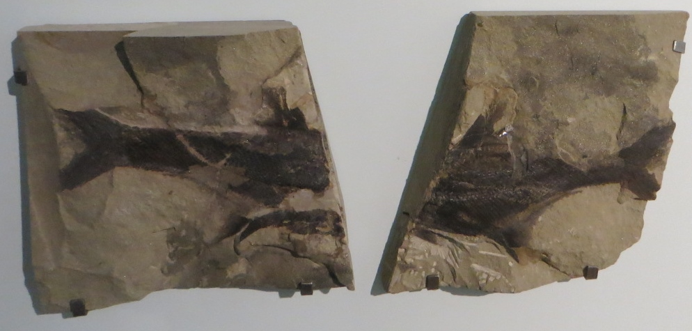 Fossil of Gyrolepis- Took the picture at Museum am Lowentor, Stuttgart